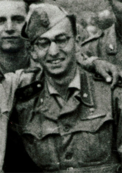 L'ufficiale del 136° Reggimento Giovani Fascisti Mario Niccolini fratello della Medaglia d'oro al Valor Militare Ippolito Niccolini, caporal maggiore dello stesso Reggimento caduto a Bir El Gobi